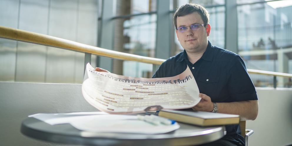 Martin Kotačka se zapojil do celostátního výzkumu Genetika a příjmení, který financuje ministerstvo vnitra.